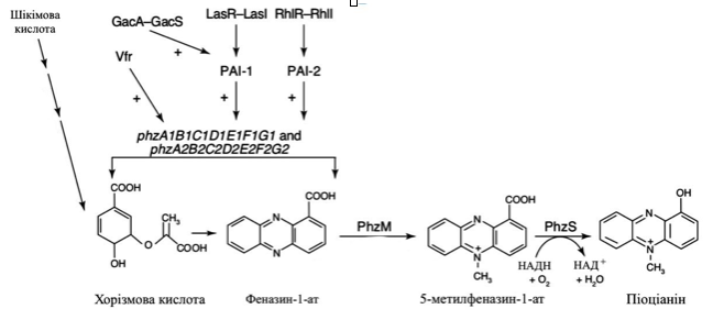 Схема біосинтезу піоціаніну